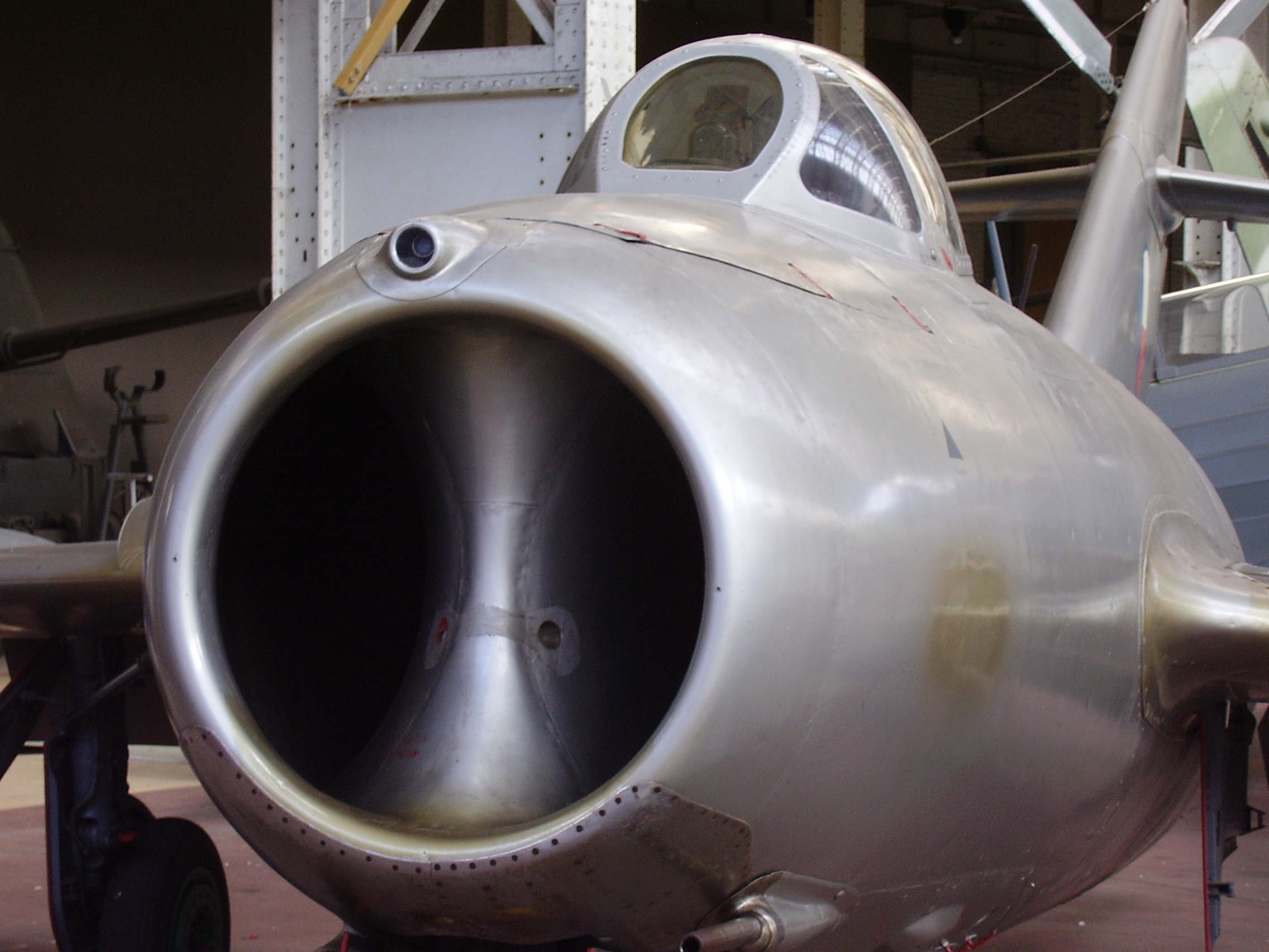 Royal Military Museum Brussels, Musée Royal de l'Armée, Koninklijk Museum van het Leger en de Krijgsgeschiedenis. MiG-15bis (or Czech-made S.103)